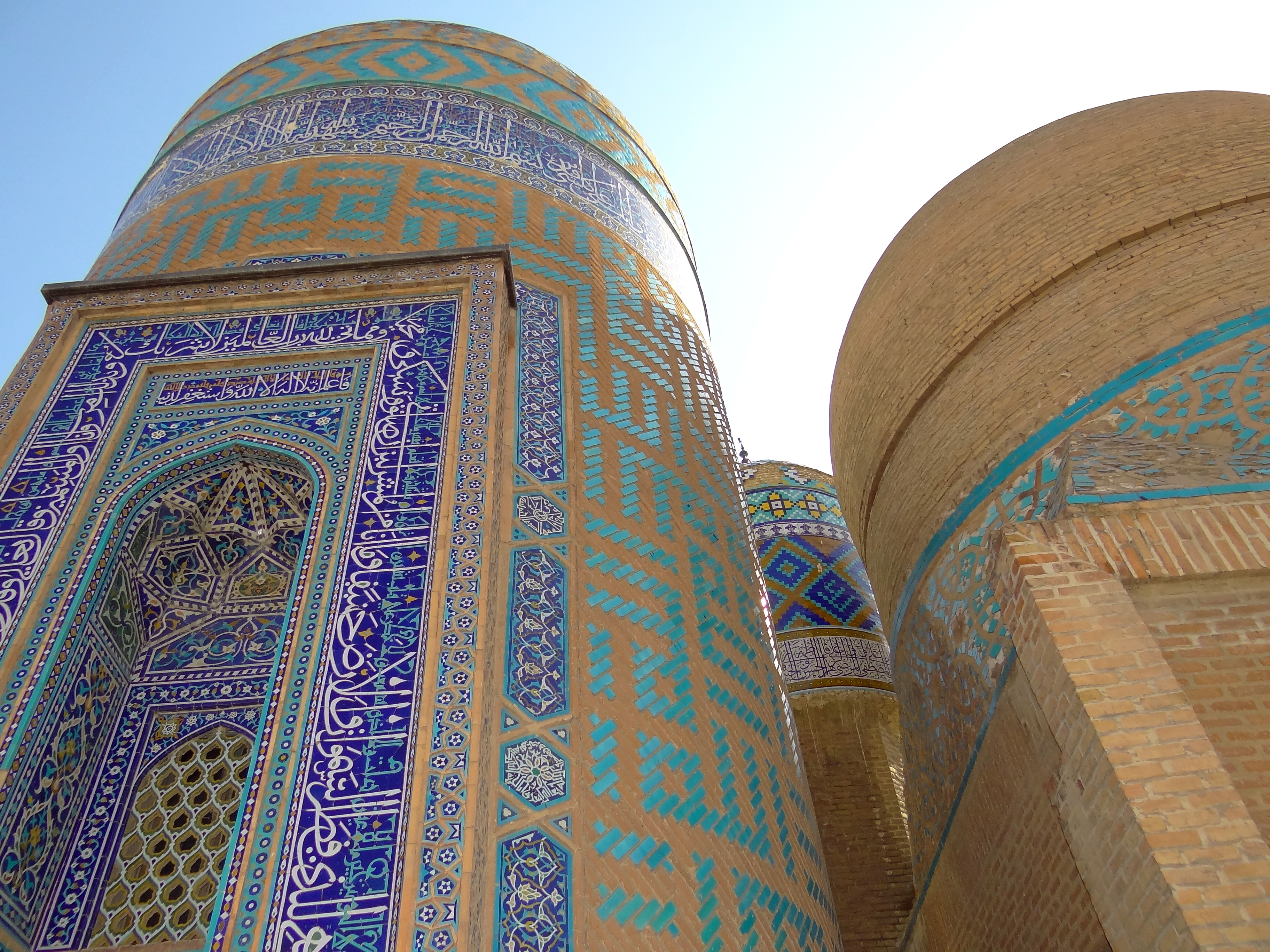 Tower of Allah (Left) - Sheikh Safi Mausoleum - Ardabil - Iranian Azerbaijan - Iran